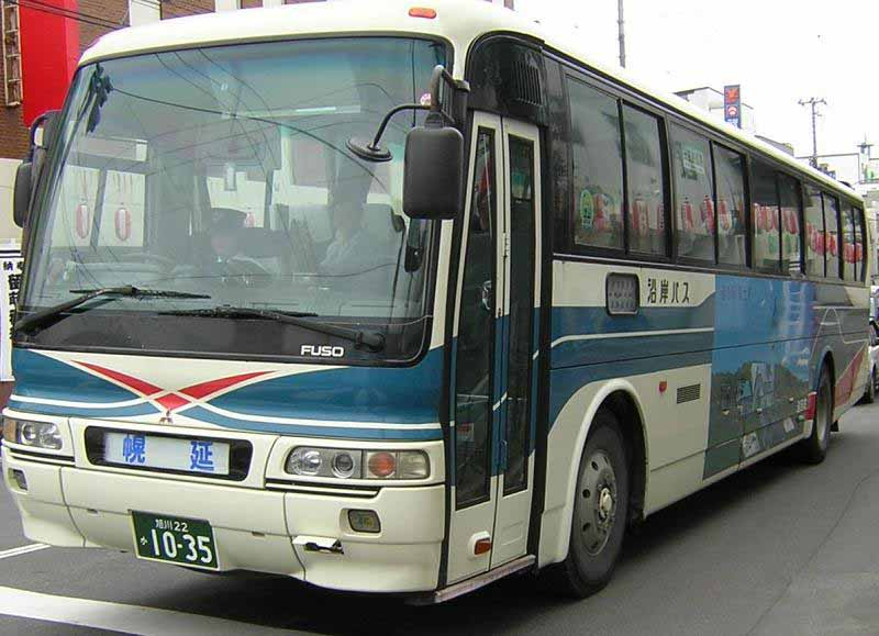 登録番号：旭川22か10-35 沿岸バス所属 快速幌延旭川線用 三菱ふそう・エアロバス